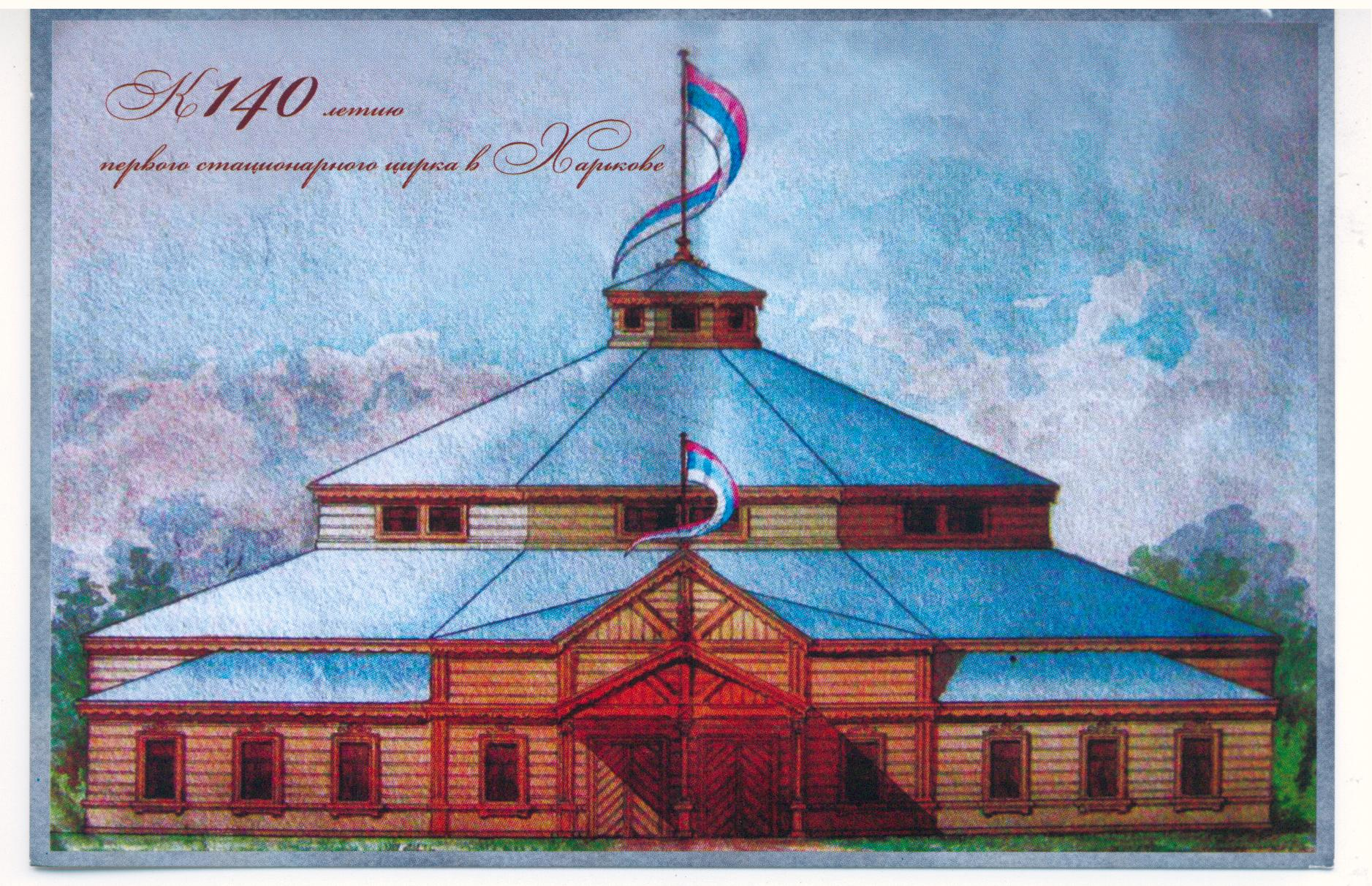 Paper Postcard Old Kharkov Wood Circus Открытое письмо (почтовая открытка) c видом проекта деревянного цирка 1892 года братьев Чинизелли на Михайловской площади (сейчас площадь Руднева) в Харькове. Репринт фирмы "Парамоновъ и сын". Надпись про 140-летие добавлена в 2000-х годах. Оригинал хранится в Государственном архиве Харьковской области (ГАХО), фонд 4, опись 118, единица хранения 39